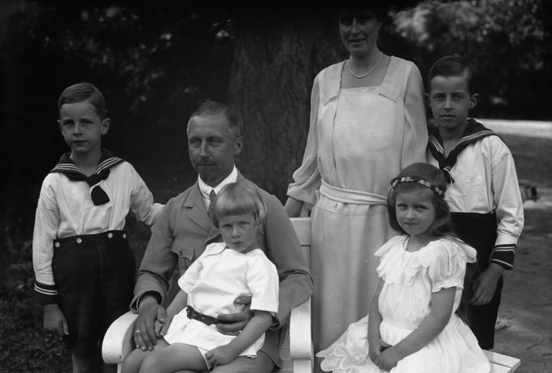 Neueste Aufnahmen des Prinzen Oskar von Preussen im Kreise seiner Familie. Unser Bild zeigt den Prinzen mit seiner Familie im Garten seiner Villa in Potsdam.